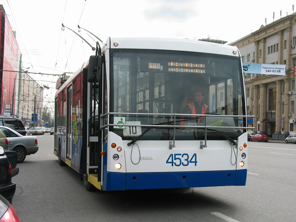 Троллейбус Тролза-5265 «Мегаполис» с защитной решёткой лобового стекла в Москве.